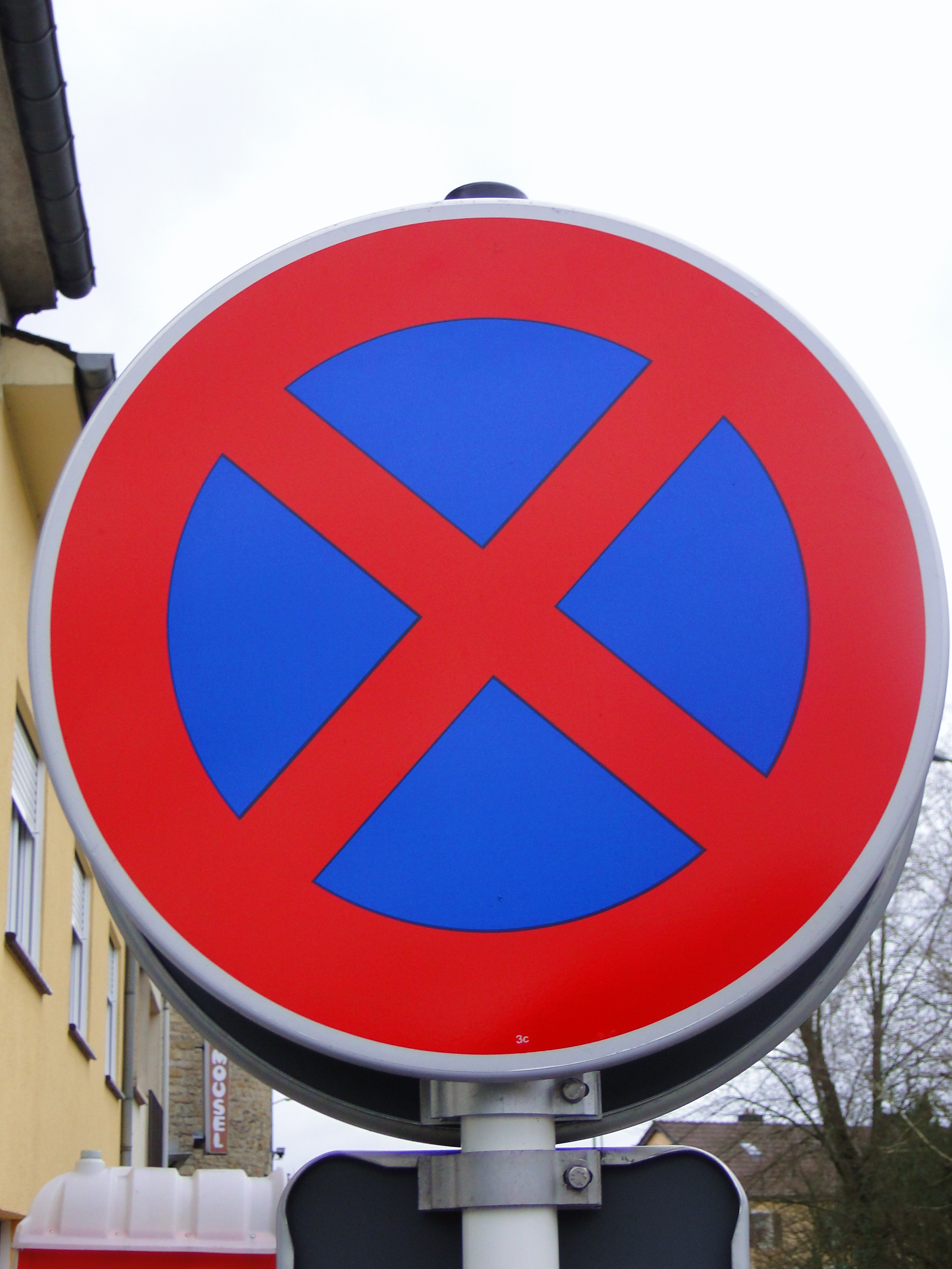 Verkéiersschëld C,19 "Arrêt et stationnement interdits" aus dem lëtzebuerger Code de la Route.